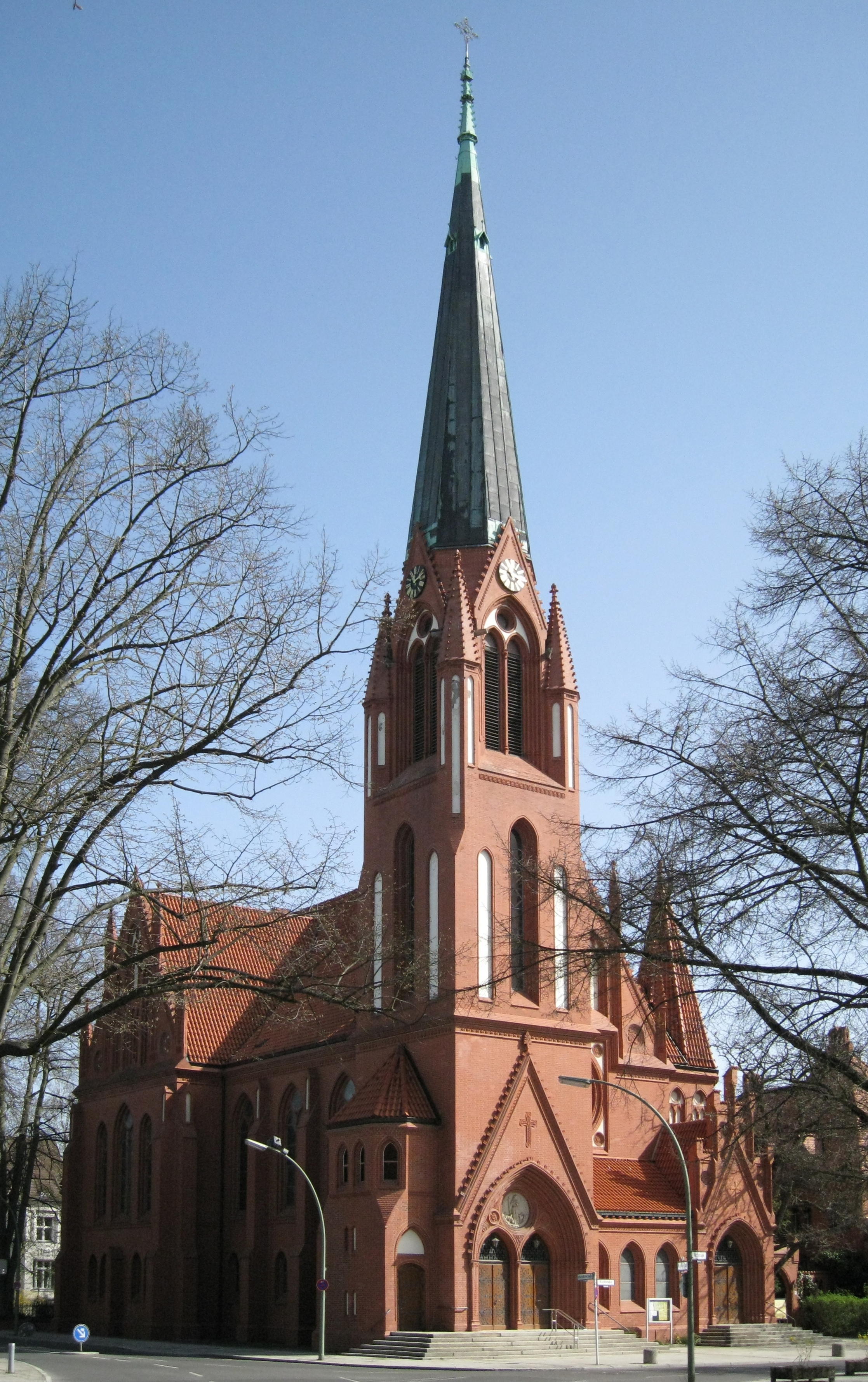 Pauluskirche Portalseite